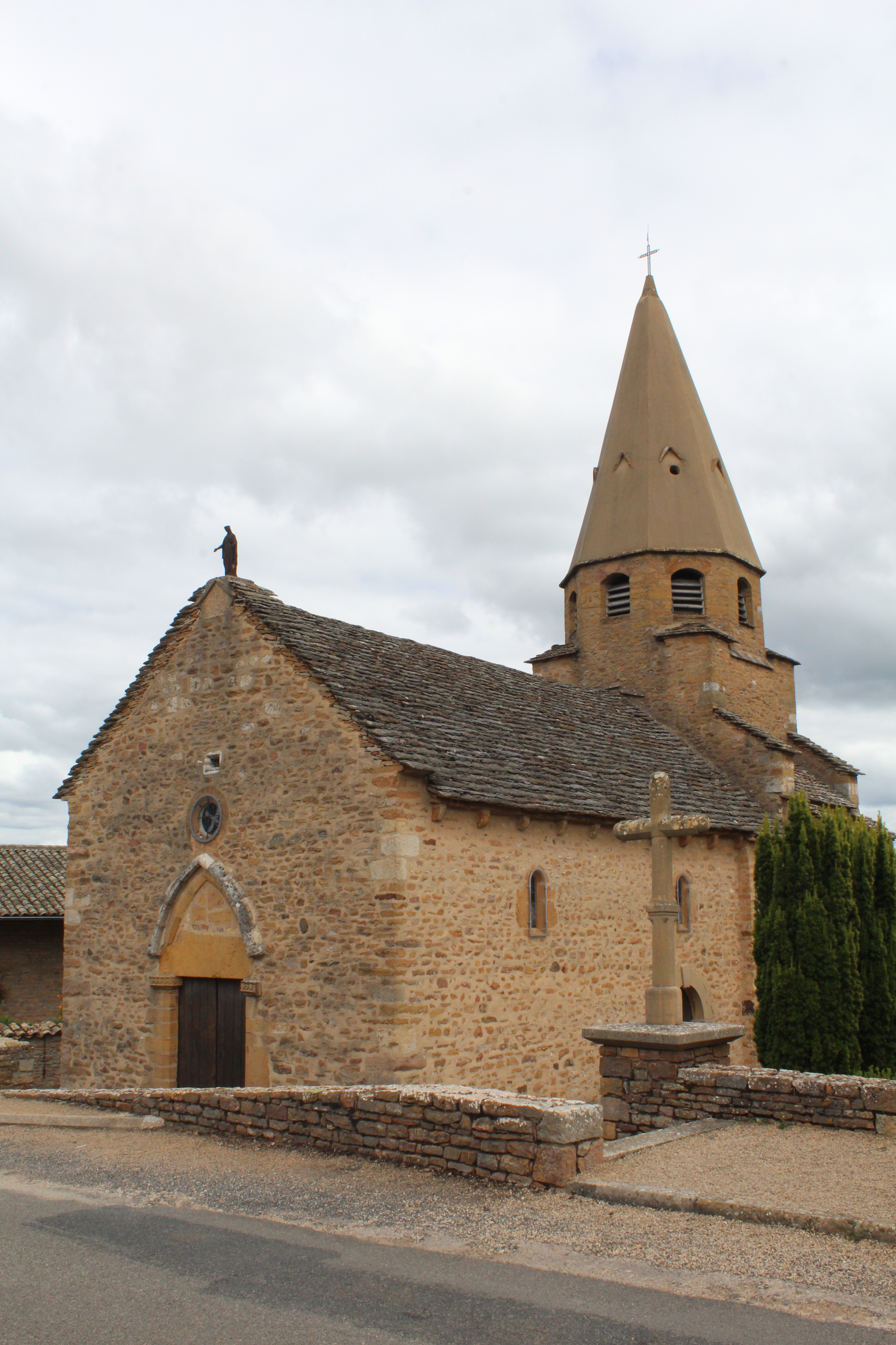 Église Saint-Véran de Saint-Vérand, Saône-et-Loire.